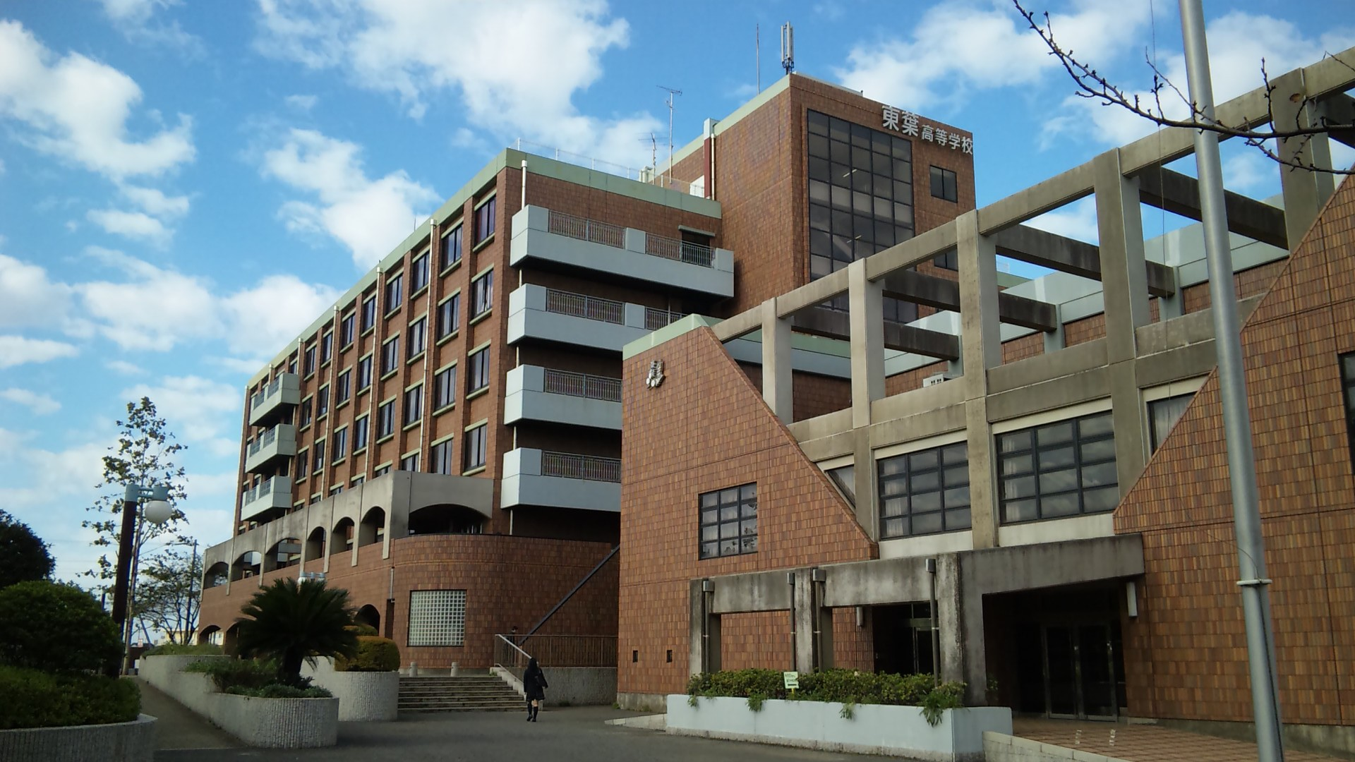 在校生により撮影